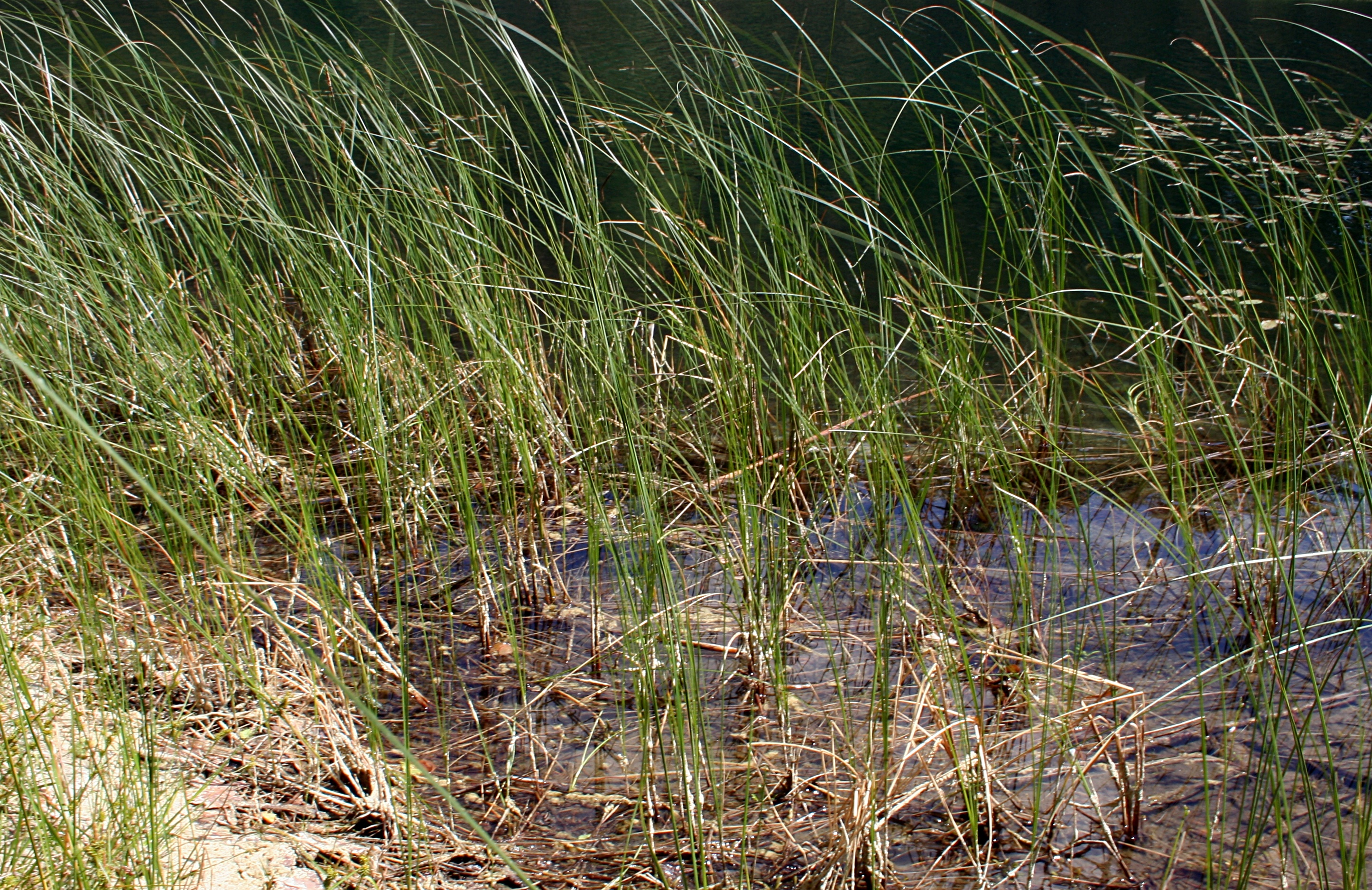 Zaborski Park Krajobrazowy, zbiorowisko turzycy nitkowatej